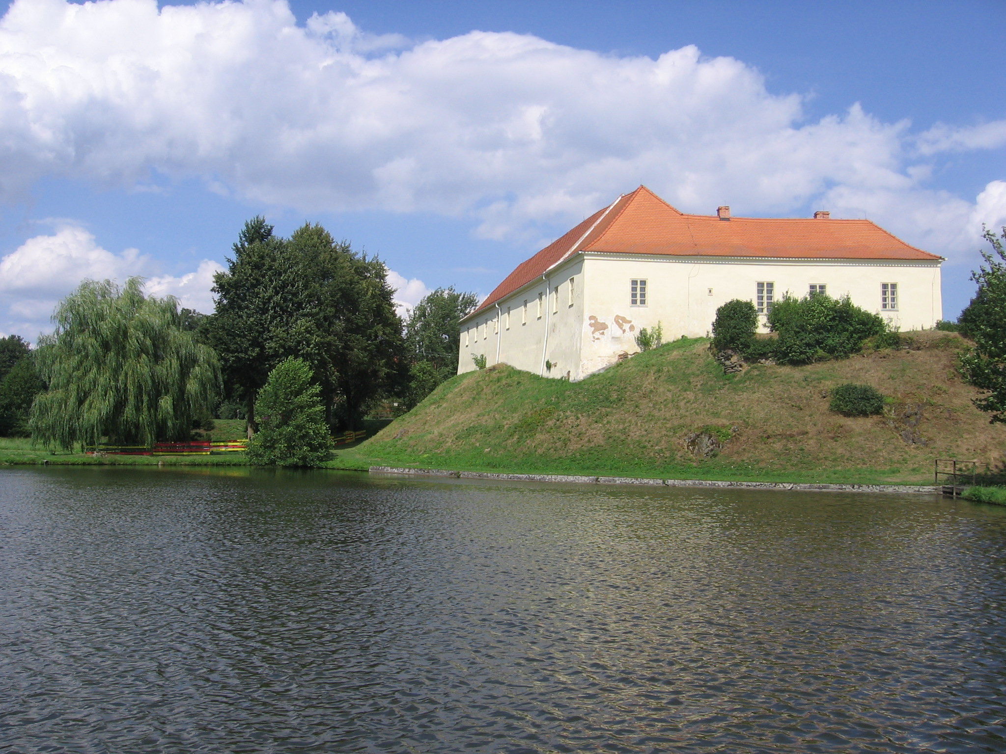 Tvrz Puclice, okres Domažlice